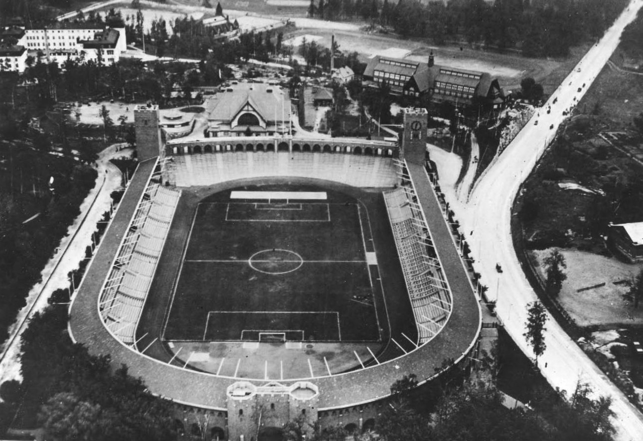 Stockholms stadion 1919, vy mot norr